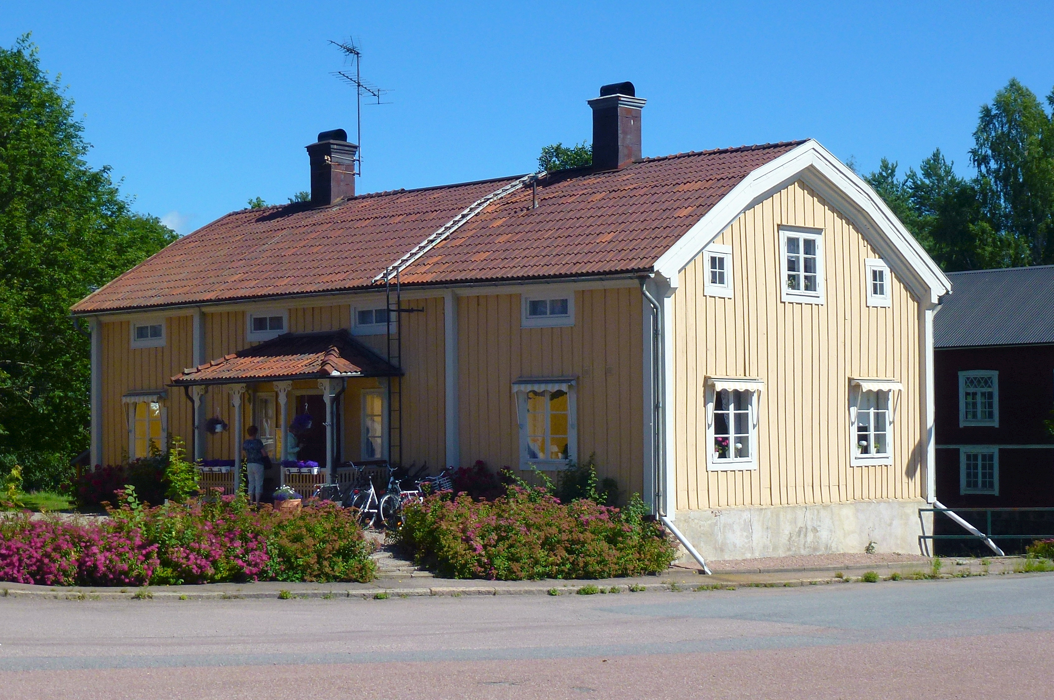 Bengtsgården. Långshyttans sista bergsmansgård, nu säte för Långshyttans brukshistoriska förening